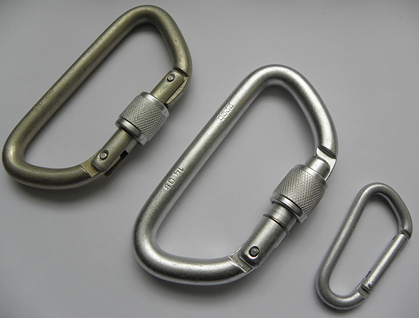 Стальной и алюминиевые карабины